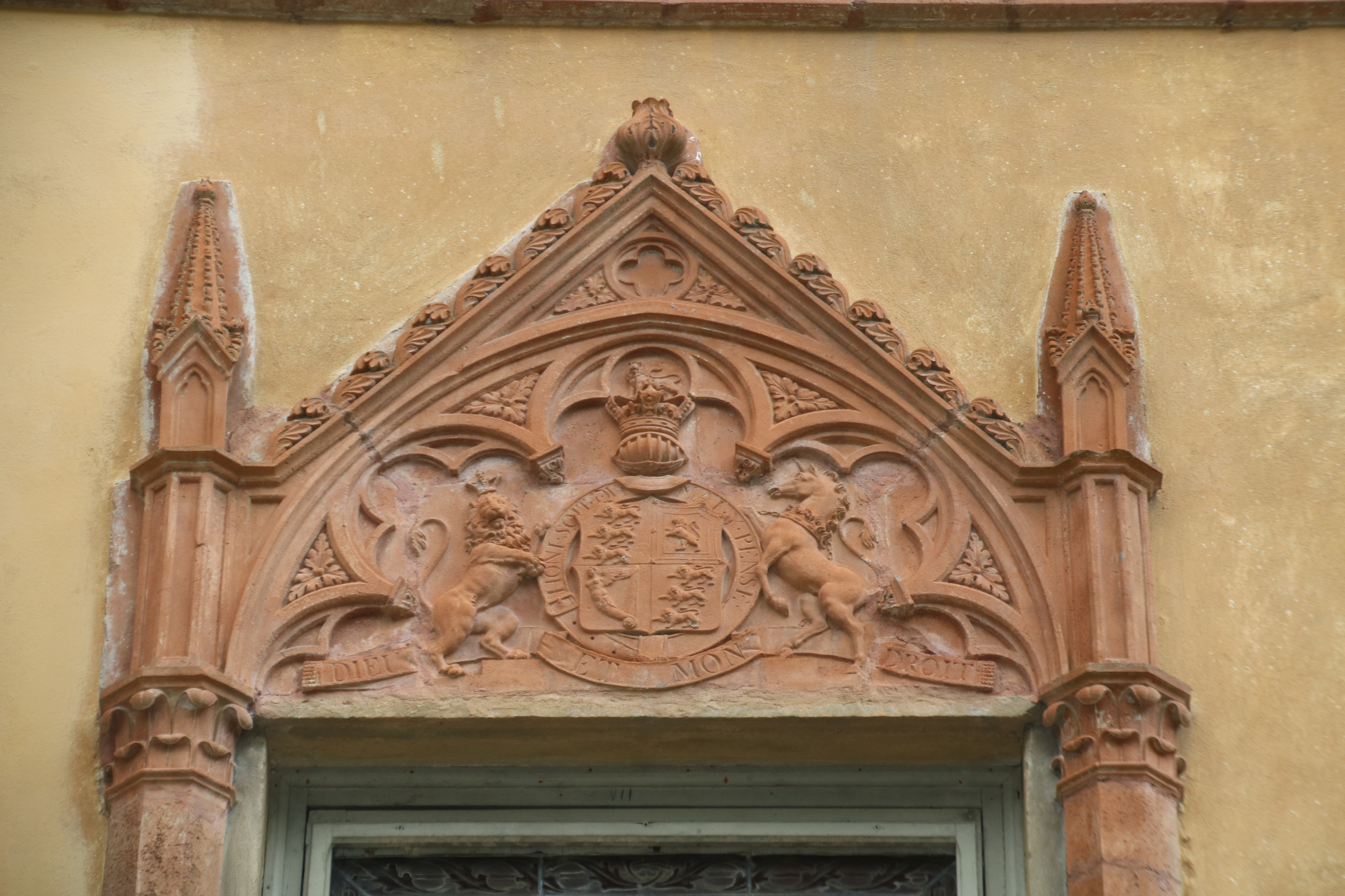 Chiesa anglicana (Bagni di Lucca) This is a photo of a monument which is part of cultural heritage of Italy.